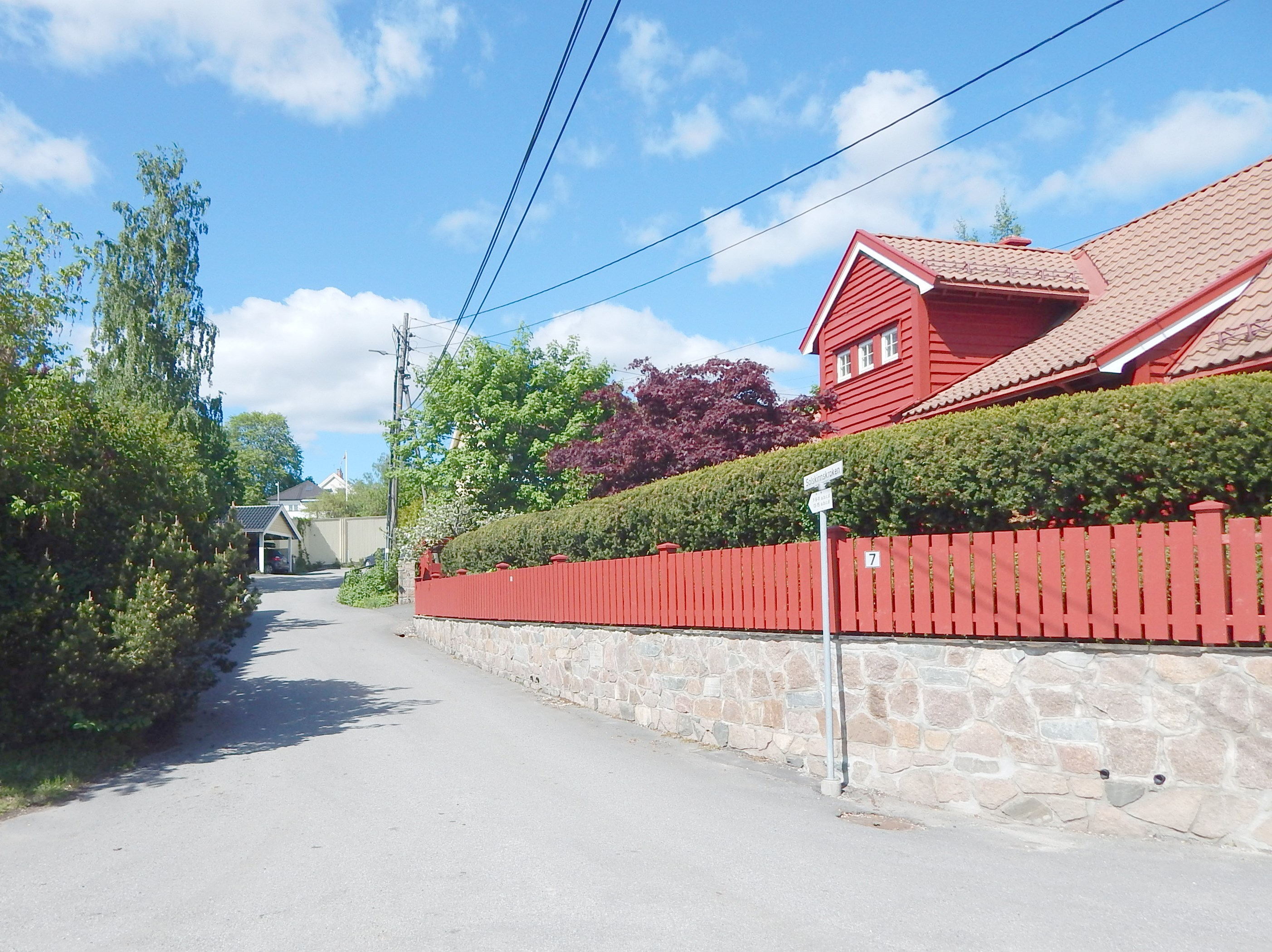 Nordvestre del av Solskinnskroken